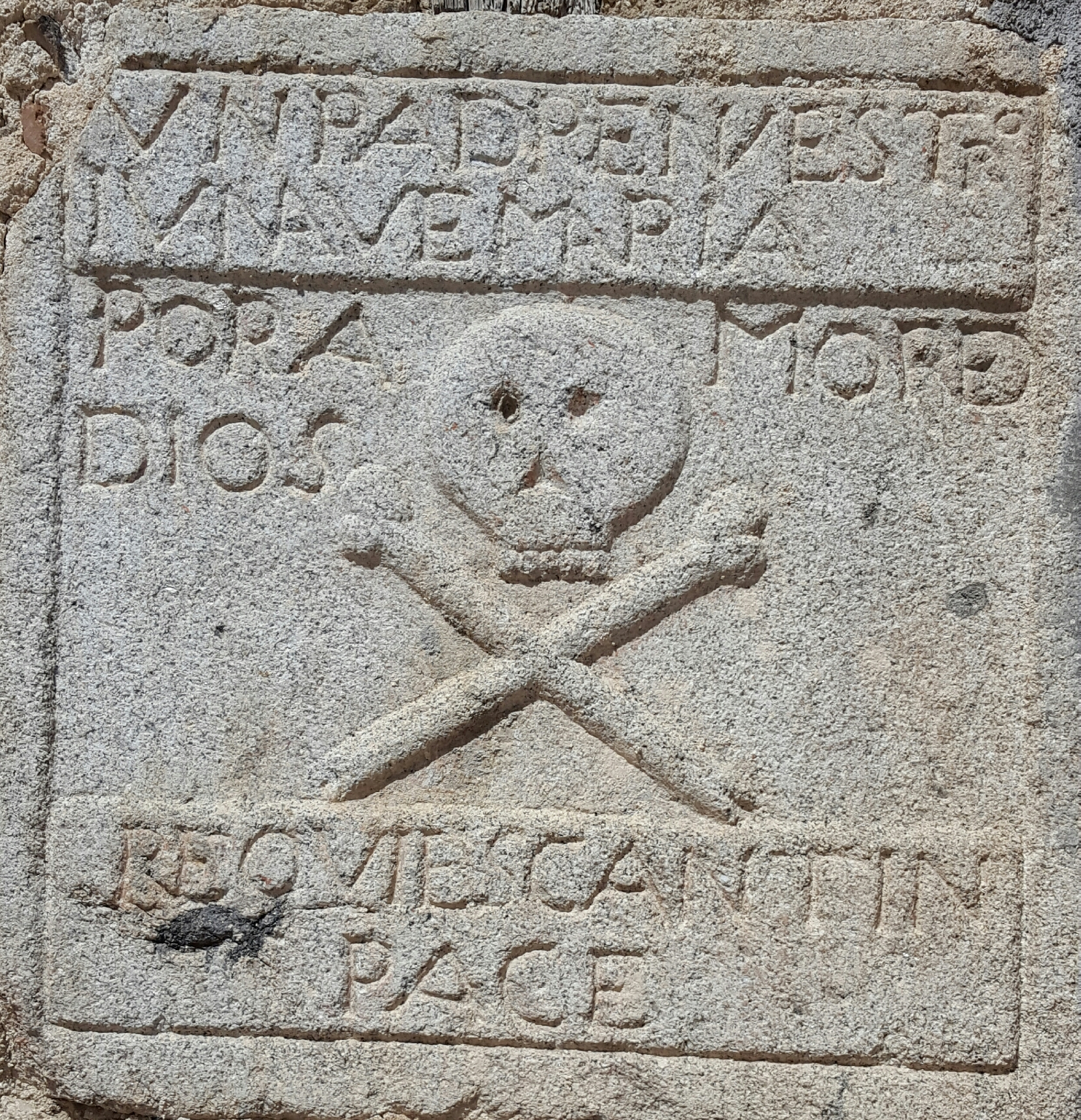 Estela funeraria integrada en la pared de la Iglesia de Padiernos, Ávila, España